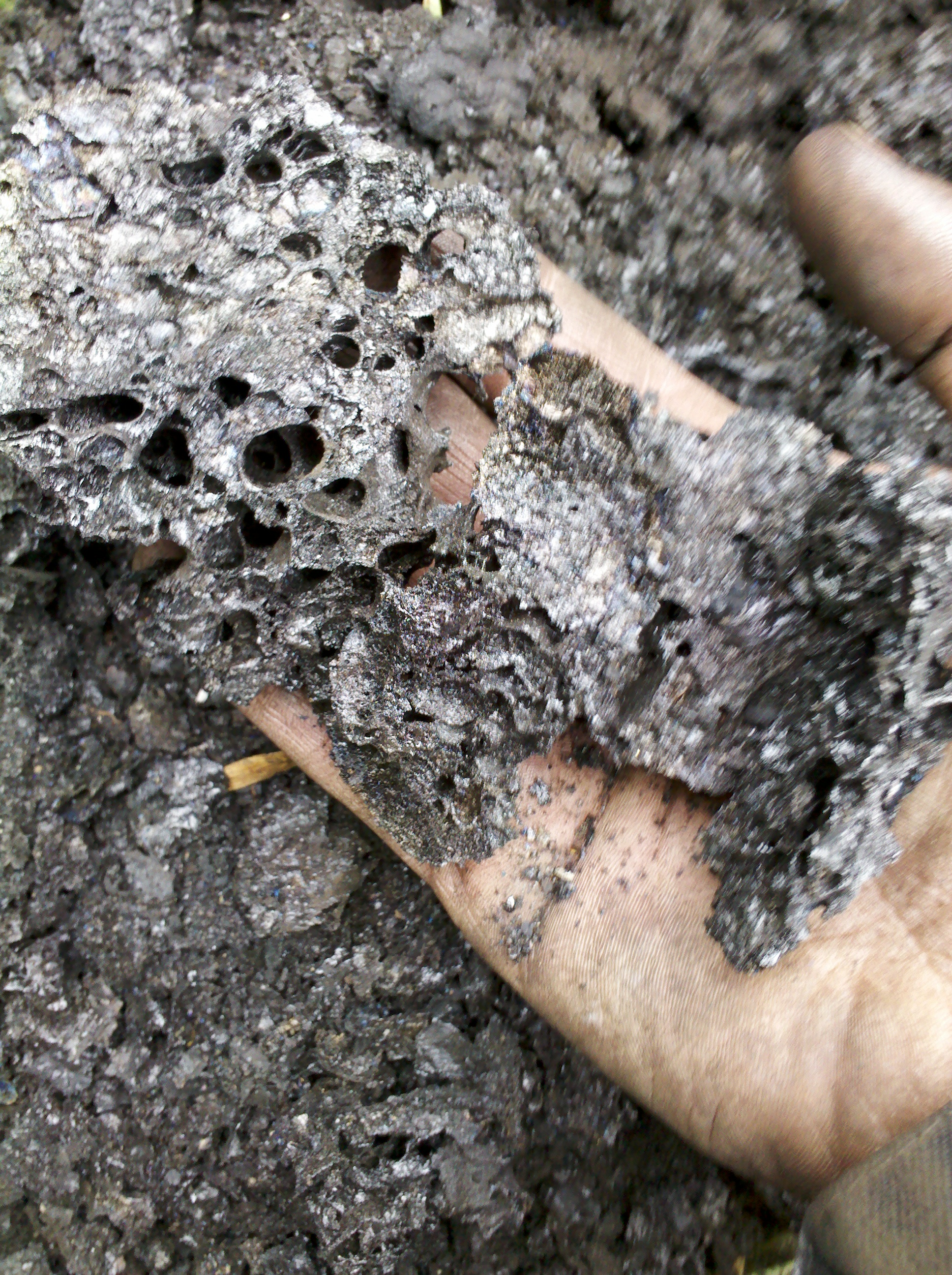 Durch Schornsteinbrand stark aufgequollener Ruß nach der Entfernung durch den Schornsteinfeger.